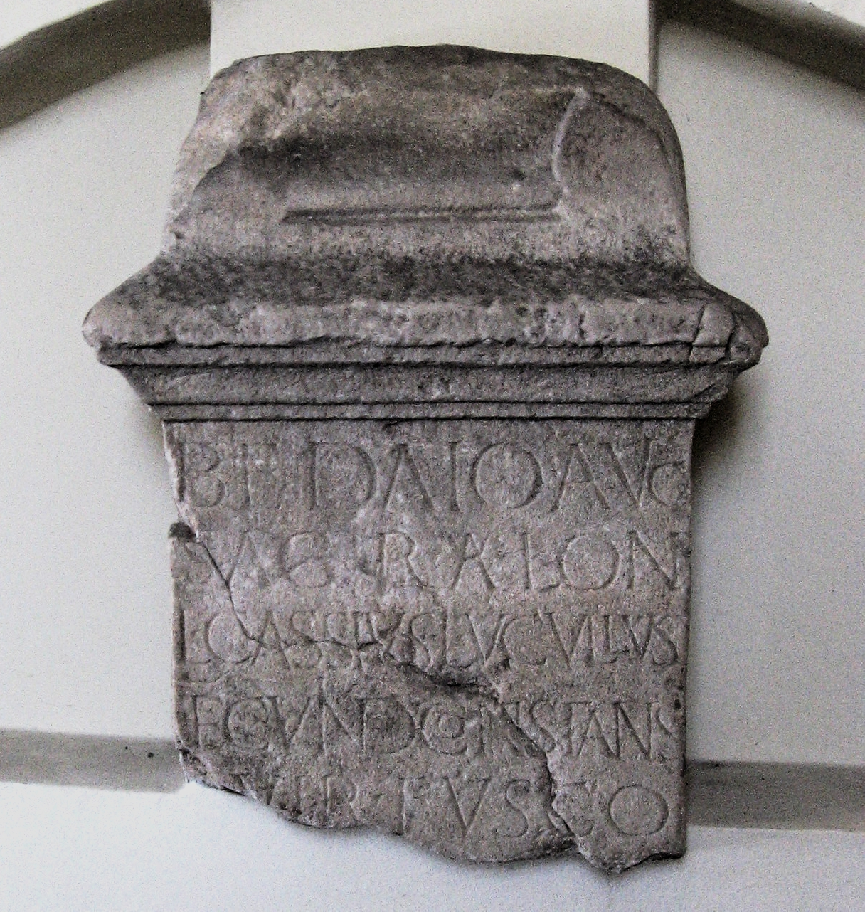 Römischer Weihestein, Bedaio, Lagerort: Chieming; Bayern; Deutschland; in der neuen Pfarrkirche Maria Himmelfahrt, hinter der Emporentreppe, Fundort war die abgerissene Pfarrkirche St. Peter. 225 d. C. CIL III 11778: Bedaio Aug(usto) / sacr(um) Alo(u)n(arum) / L(ucius) Cassius Lucullus / et C(aius) Vind(ius) Constans / [I]Ivir(i) Fusco / [II et Dextro co(n)s(ulibus)]